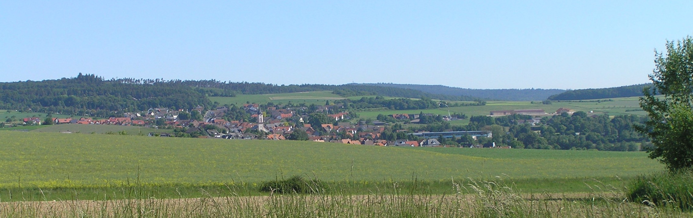 Eschbach, Ortsteil von Usingen, Deutschland. Aufnahme von Usingen aus.